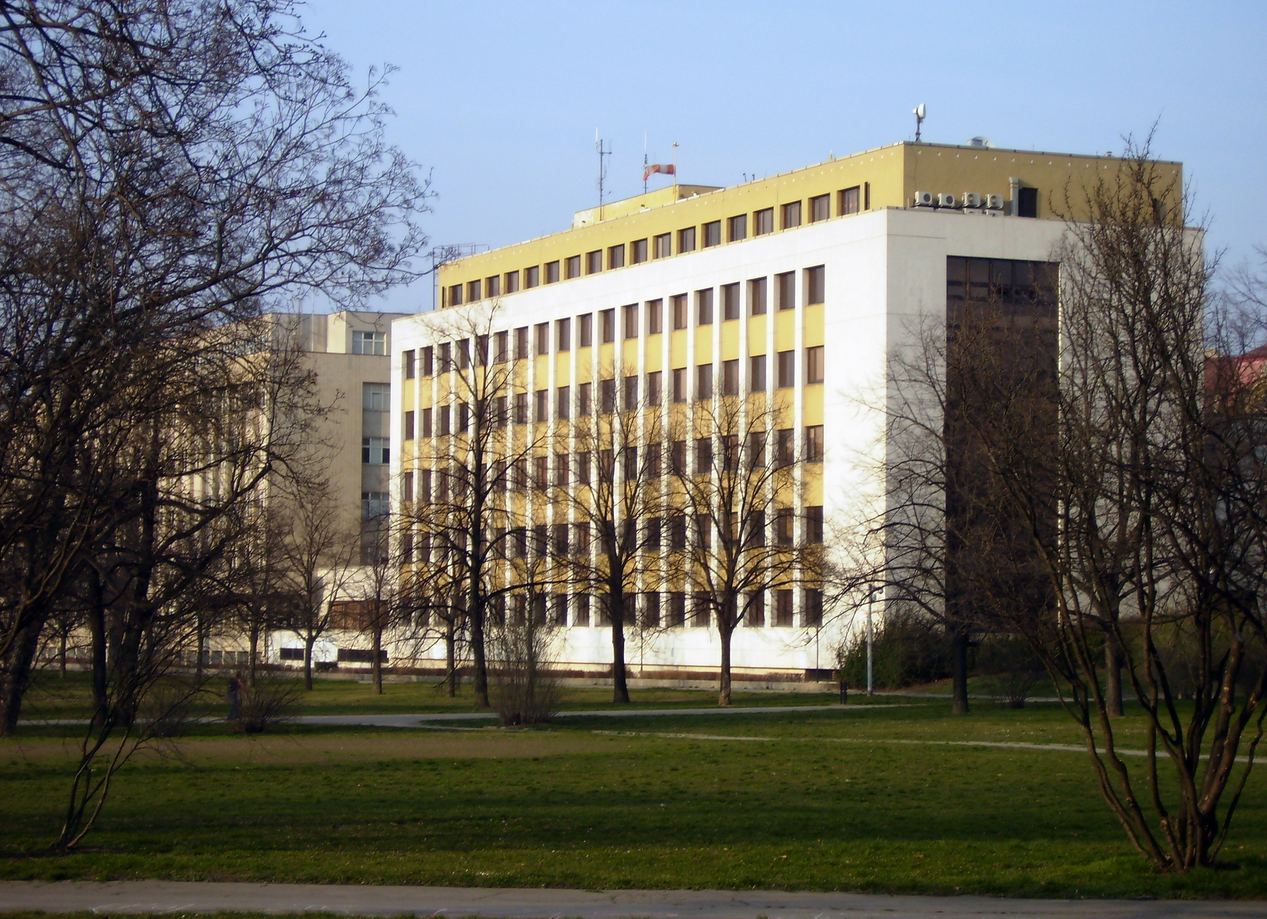 Budova ministrstva vnitra na Letné.